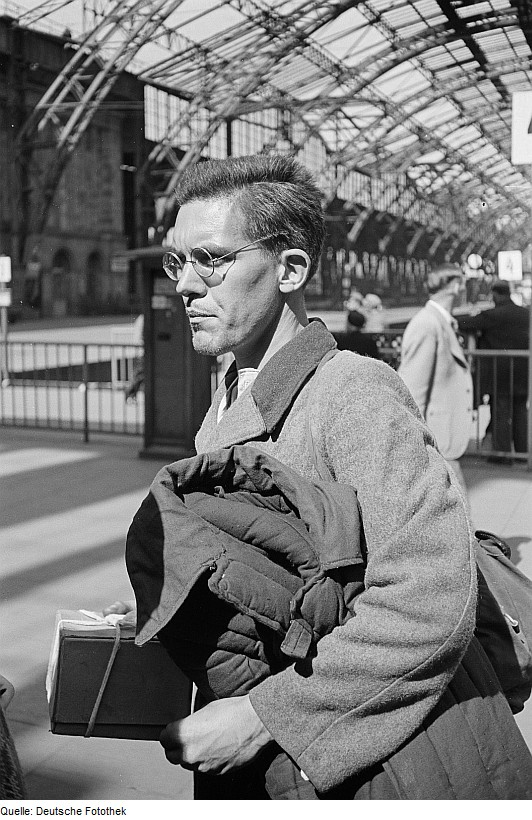 Original image description from the Deutsche Fotothek Heimkehrer mit Gepäck